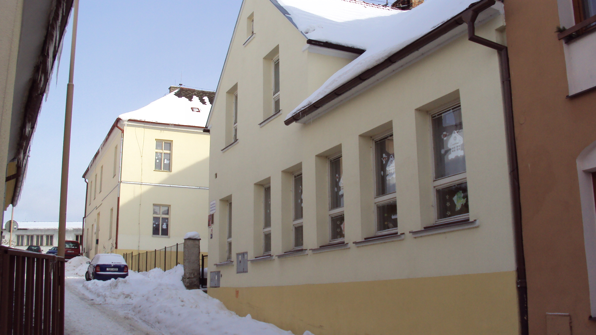 Základní škola v Nerudově ulici, poblíž centra České Lípy